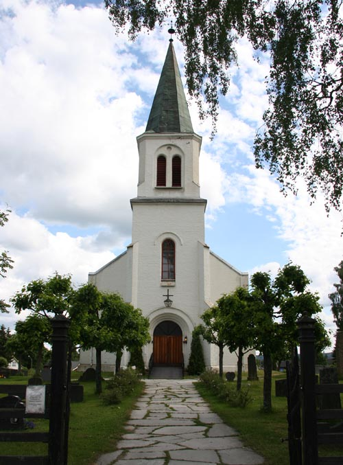 Råholt kirke